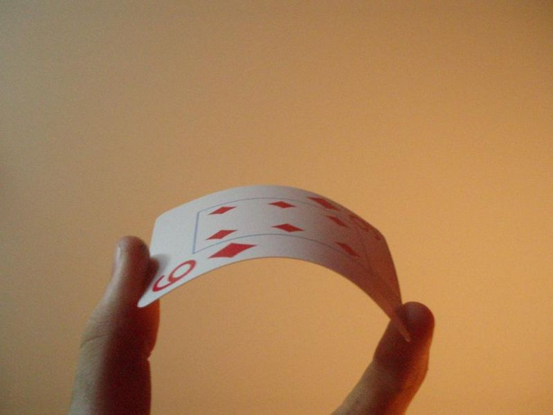 Plastikkarten